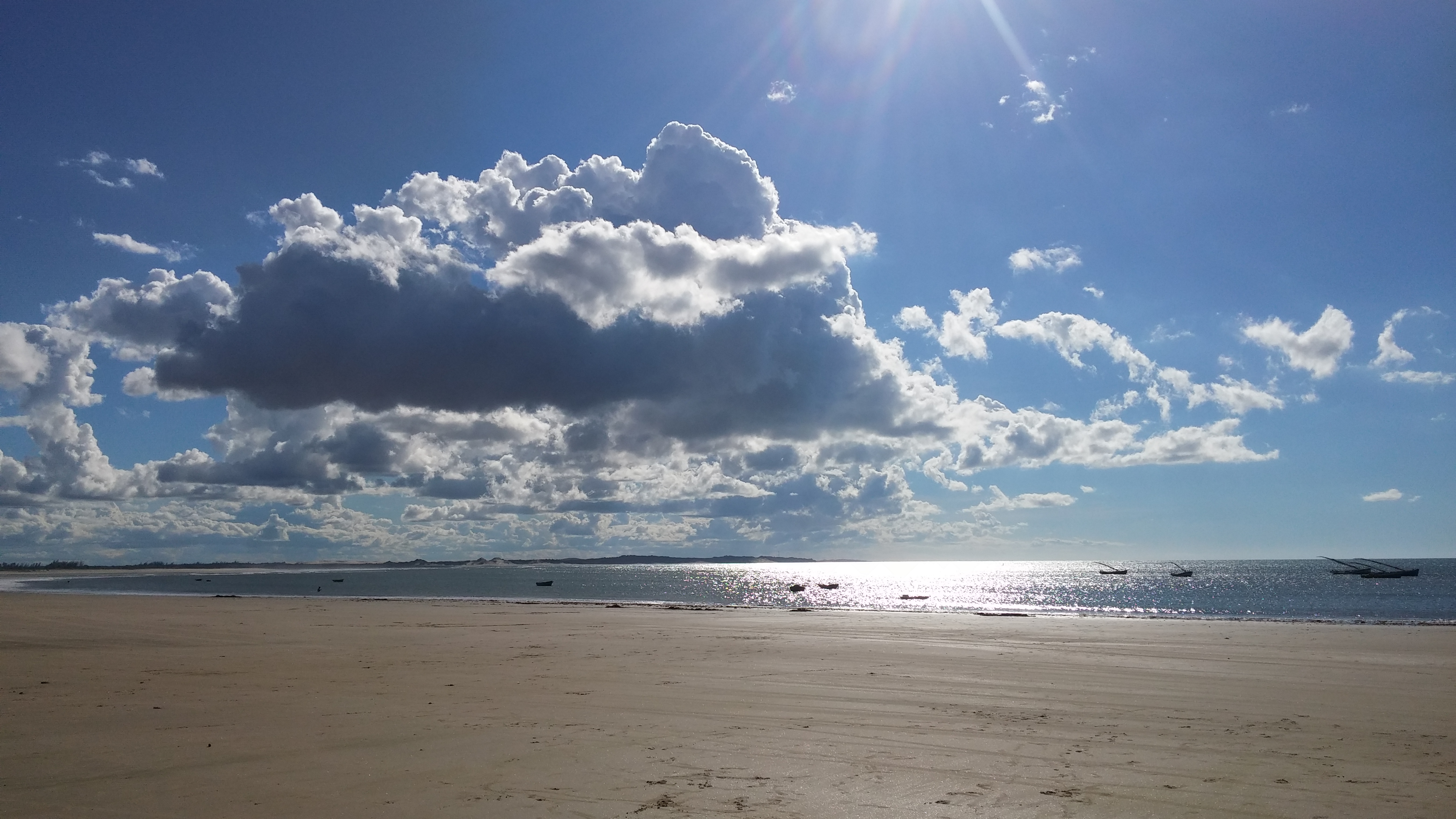 Praia de Mundaú no Ceará com a imensidão do mar e suas jangadas em dia sol.